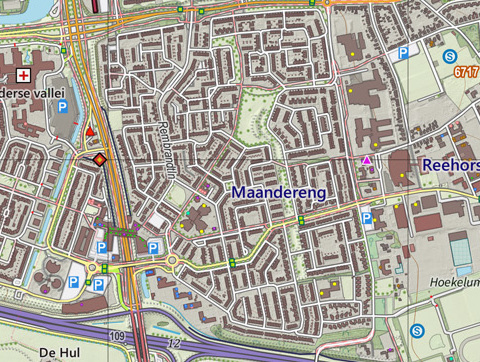 Topografische kaart van Ede (woonplaats). Resolutie: 300 pixels/km. Kaartbeeld samengesteld uit de open geodata van de Top10NL en Top25namen (Basisregistratie Topografie, Kadaster), Creative Commons BY licentie. Gebouwvlakken uit open geodata BAG extract. Wegen uit de OpenStreetMap, OpenStreetMap community. Reliëfschaduw uit de Actuele Hoogtekaart AHN2. Samenstelling en kleurenschema: Jan-Willem van Aalst, met QGIS2. Zie ook de Legenda.